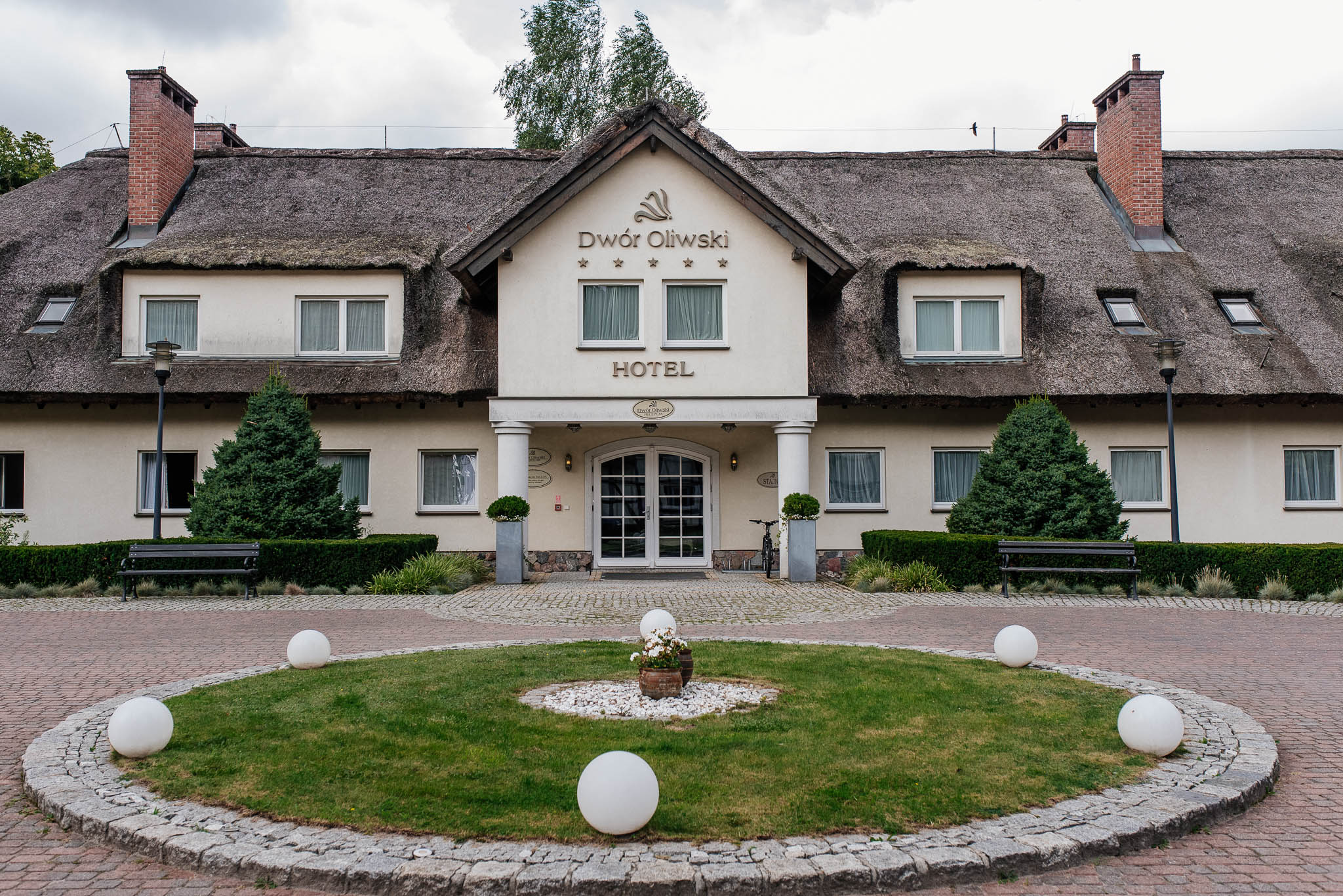 Hotel Dwór Oliwski, frontowe wejście.